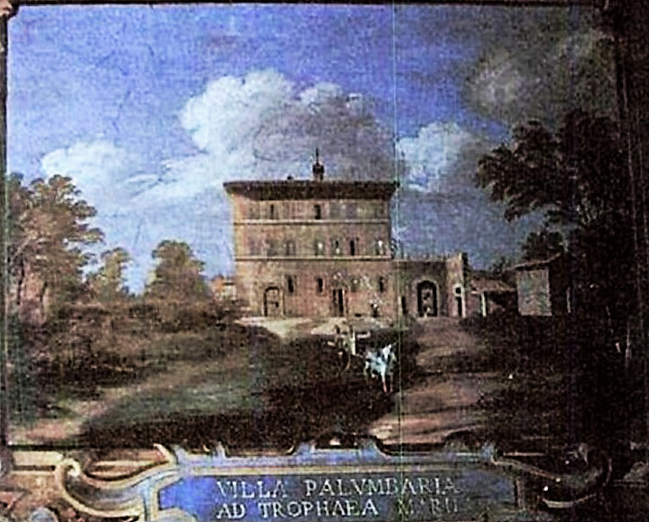 Villa Palombara a Roma, oggi non più esistente, raffigurata in un affresco realizzato nel 1859 da Annibale Angelini, e situato all'ultimo piano di Palazzo Massimo alle Colonne